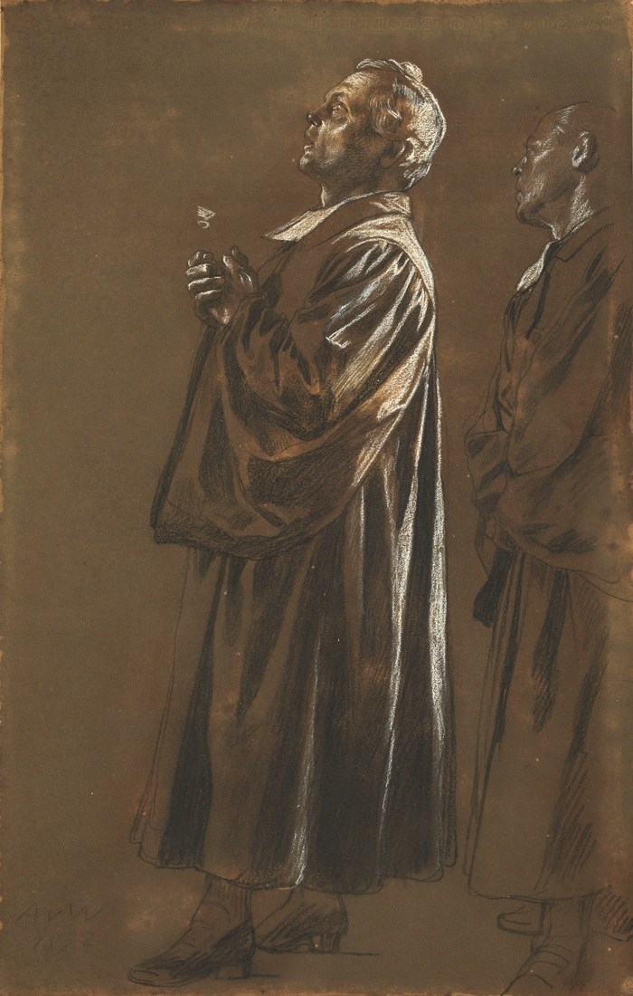 „Reformierter Bischof D. Benjamin Ursinus“, Studie zu „Die Krönung Friedrichs I. zum König in Preußen“, 1887, ehemals in der Ruhmeshalle des Berliner Zeughauses (Kriegsverlust). Schwarze Kreide, weiß gehöht, auf braunem Bütten, vom Künstler auf Karton aufgezogen. 47,5 x 30,3 cm